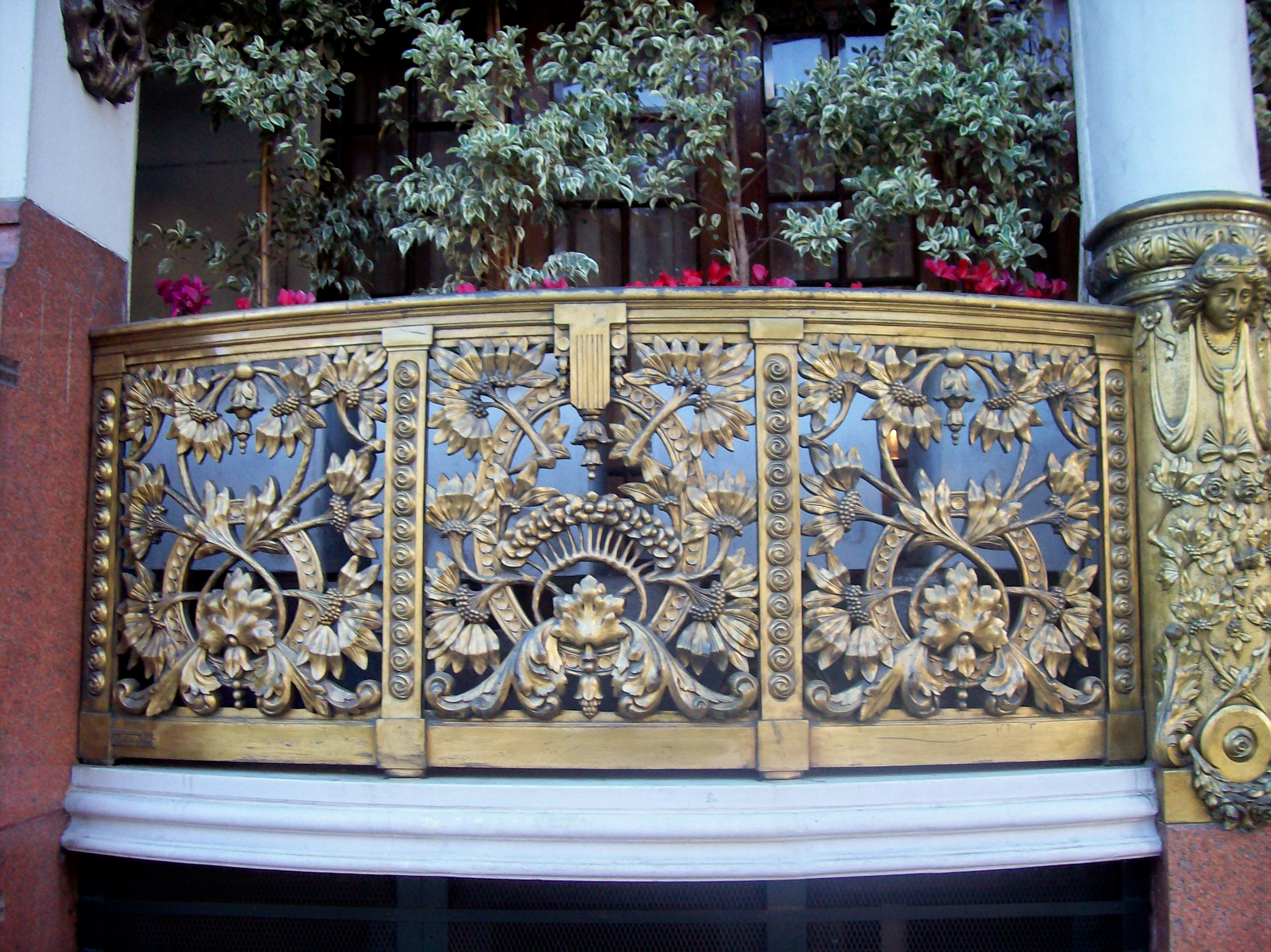 Balcón del edificio del Club Español, en Bernardo de Irigoyen 176, Buenos Aires, Argentina.